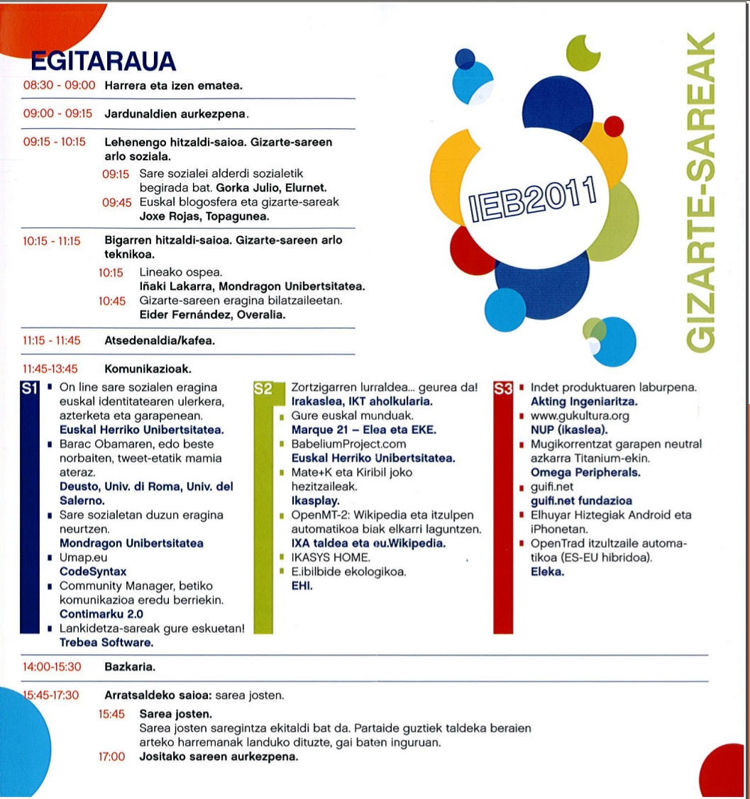 VIII IEB bilkuraren egitaraua